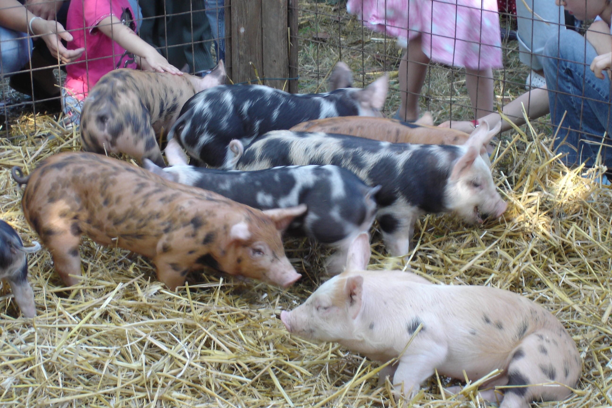 Ferkel auf dem Berger (Vieh-)Markt